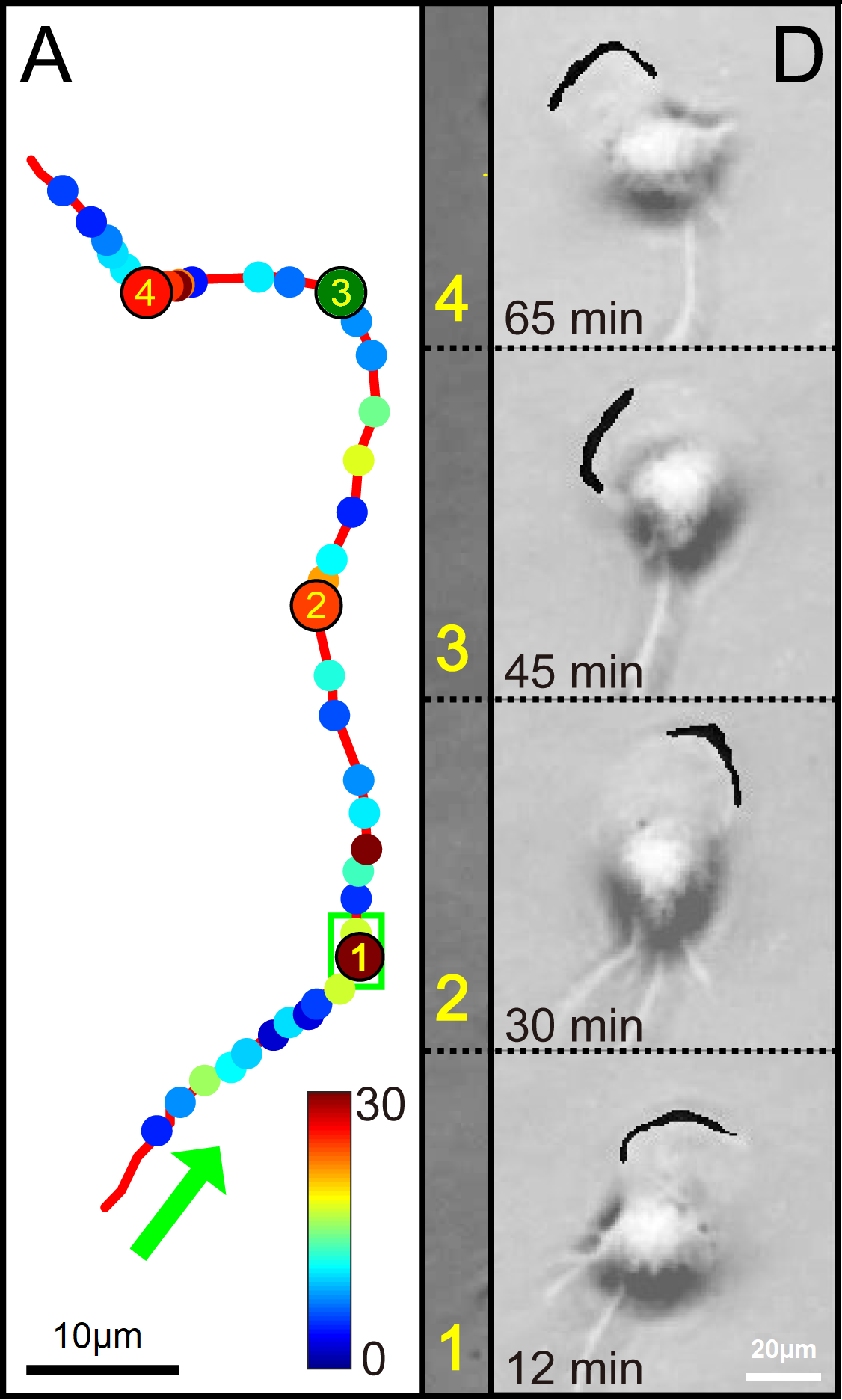 Fig. 1. Giros en zigzag realizados por una célula de microglía que se arrastra libremente y una zona activa alterna de ondulaciones periféricas en su frente delantero. A) Una trayectoria en zigzag típica en imágenes secuenciales muestreadas a un intervalo de 15 s durante 90 minutos. Los puntos de giro individuales se designan mediante los puntos cuyos colores muestran los ángulos de giro. Cuatro círculos etiquetados con los números (1 a 4) corresponden a los puntos de tiempo (12, 30, 45 y 65 minutos en ese orden). D) Imágenes que resaltan la zona activa de ondulaciones periféricas a lo largo del frente delantero. En aras de la claridad, la zona activa de los volantes periféricos se indica con un negro saturado (mediante umbralización y binarización). Las barras de escala en (A) 10 μm, y (C) 20 μm, respectivamente.